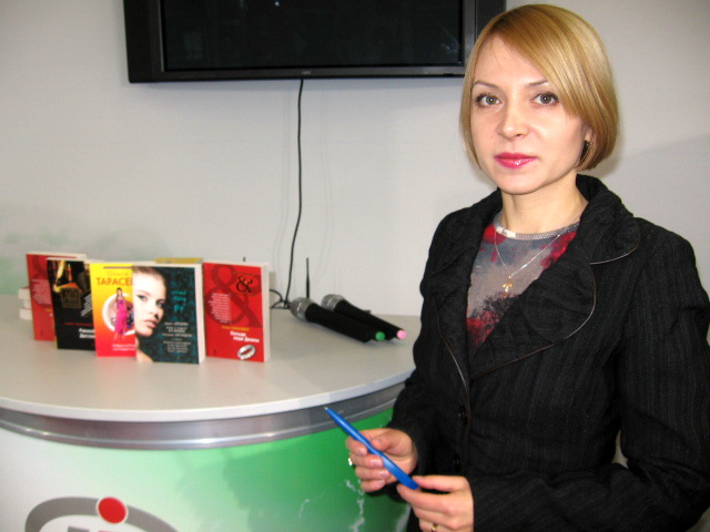 Писательница из Беларуси Ольга Тарасевич